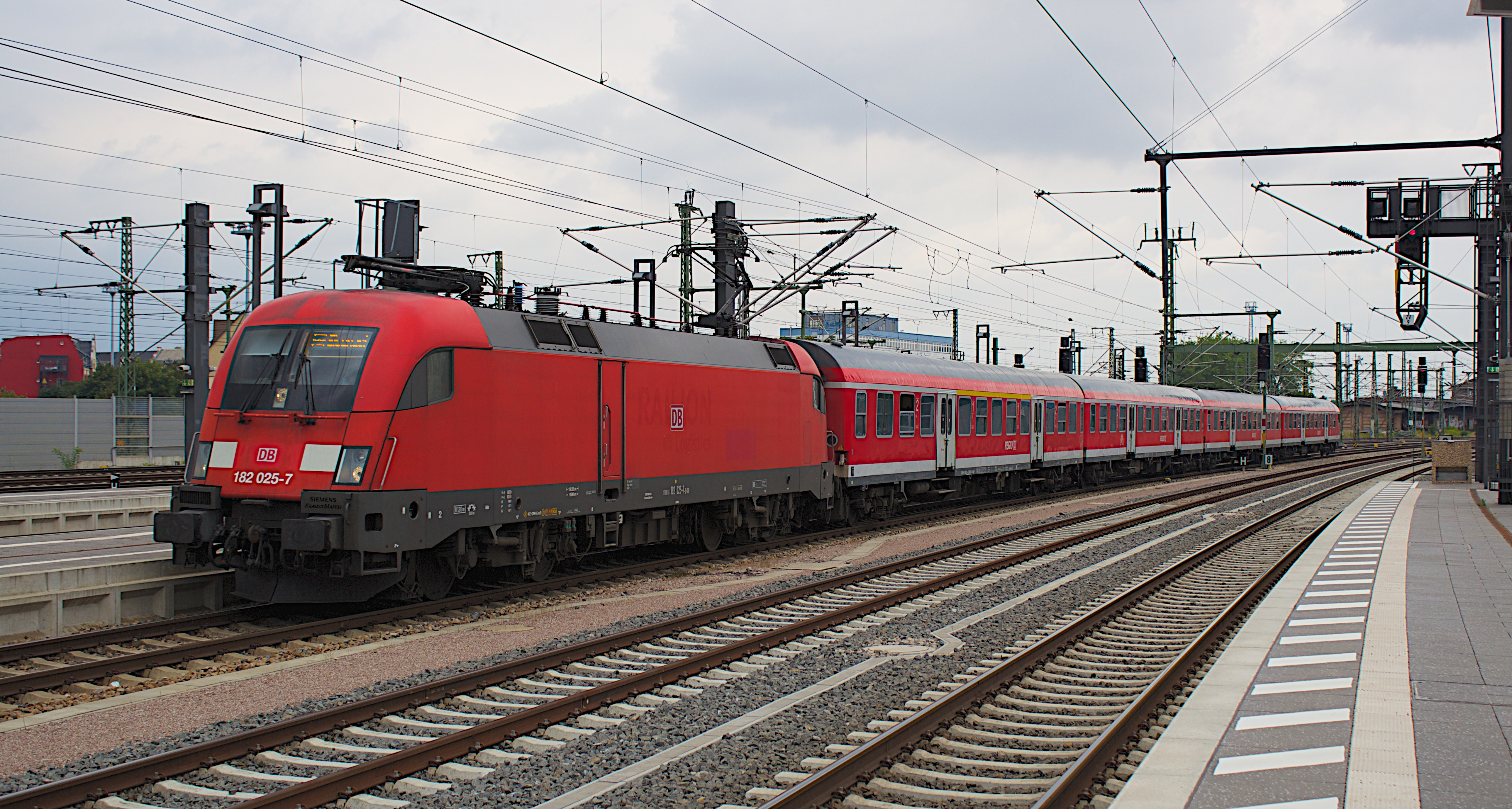 RB 16318 von Halle(Saale) Hbf nach Eisenach.